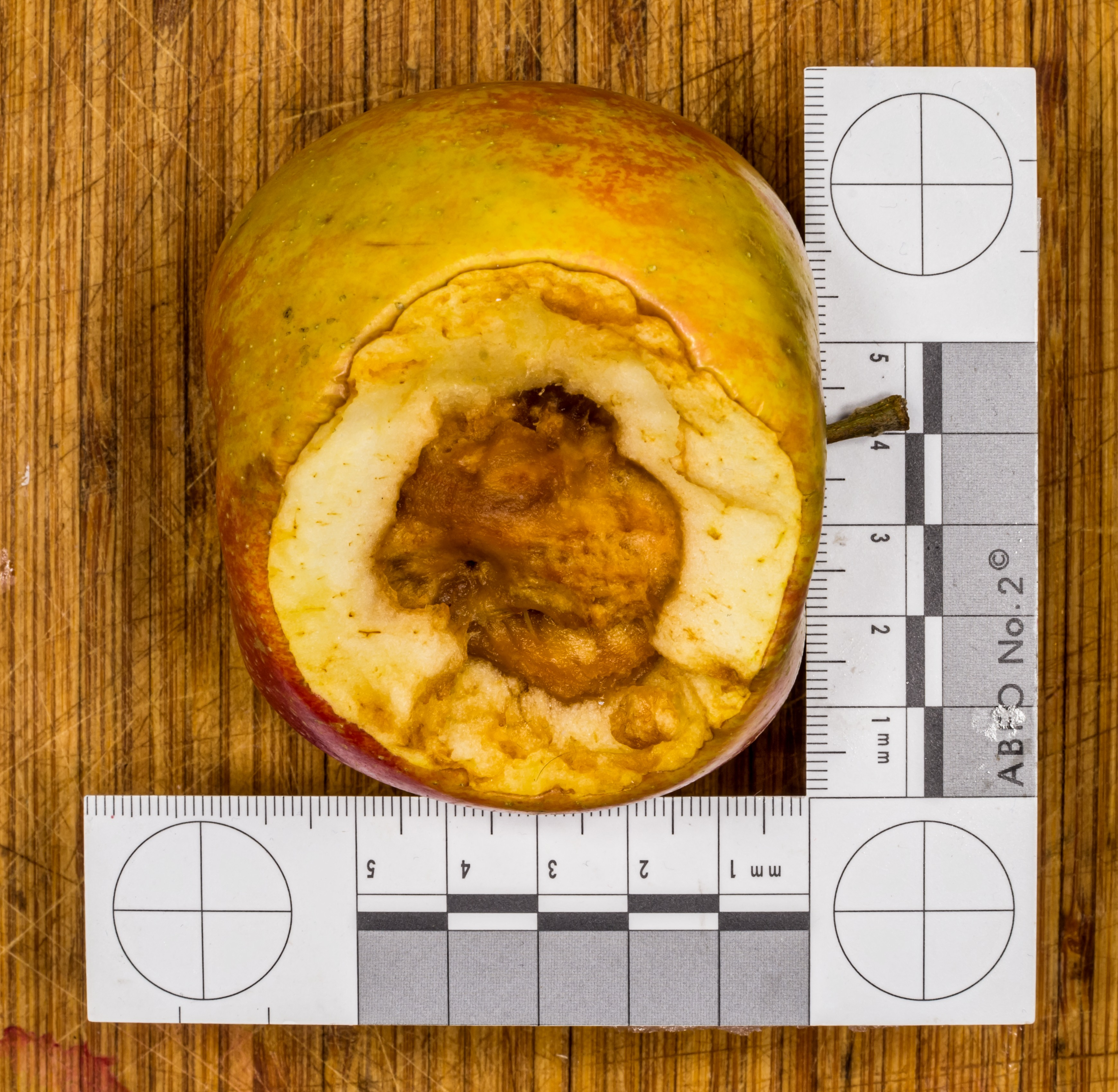 Apfel mit Fehlstelle im Inneren Gesamtansicht. es müsste sich um Kernhausfäule handeln.